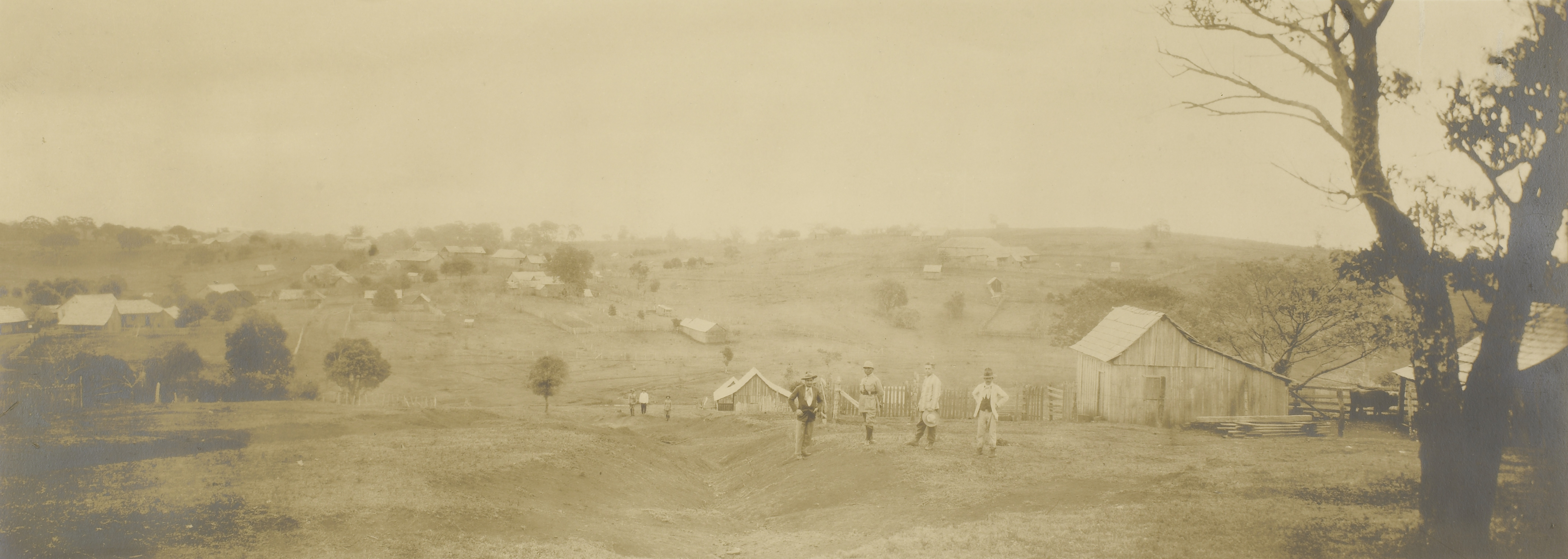 Imagem do Fundo Ministério da Guerra, do Arquivo Nacional